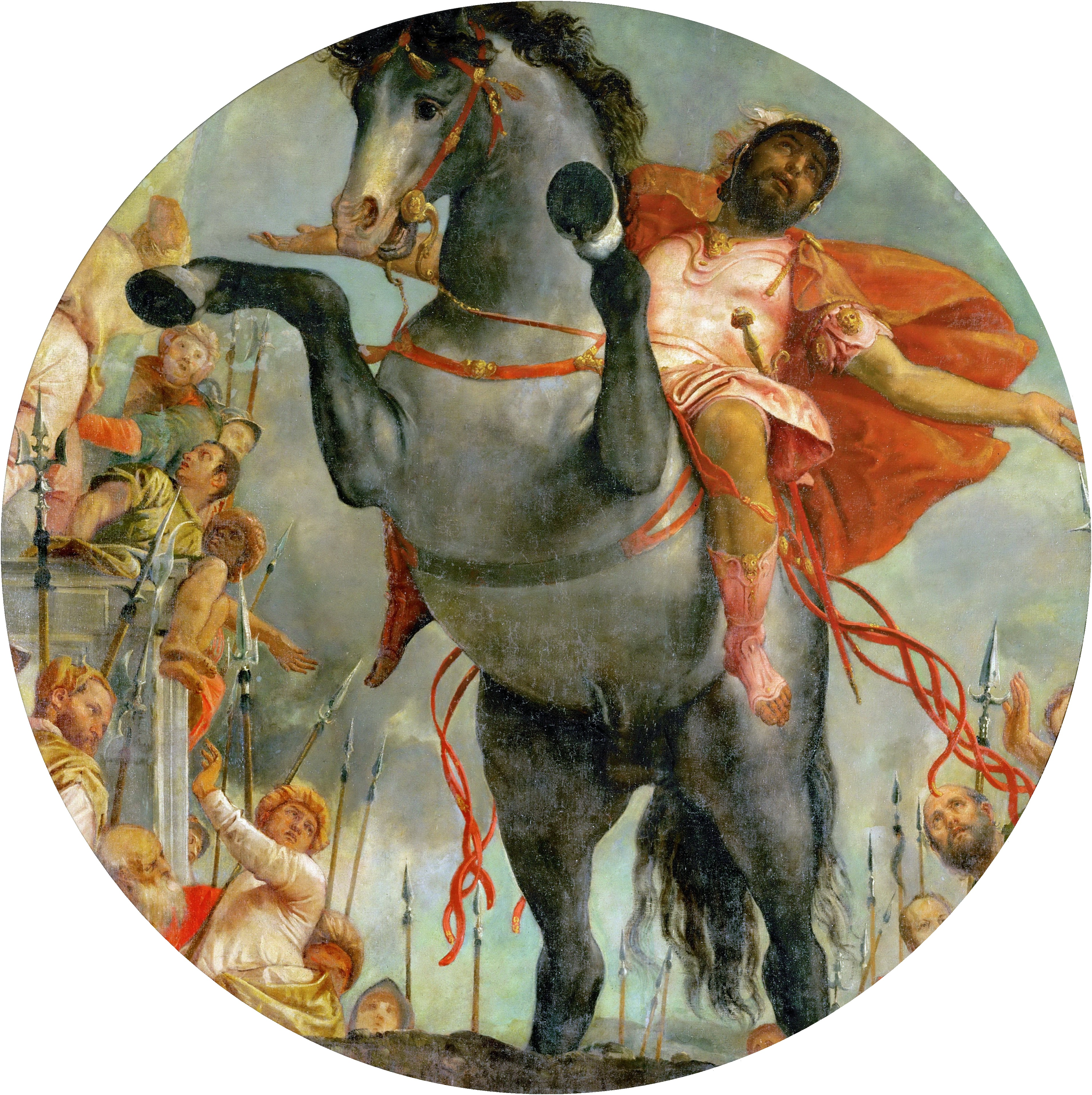 Deckenbild